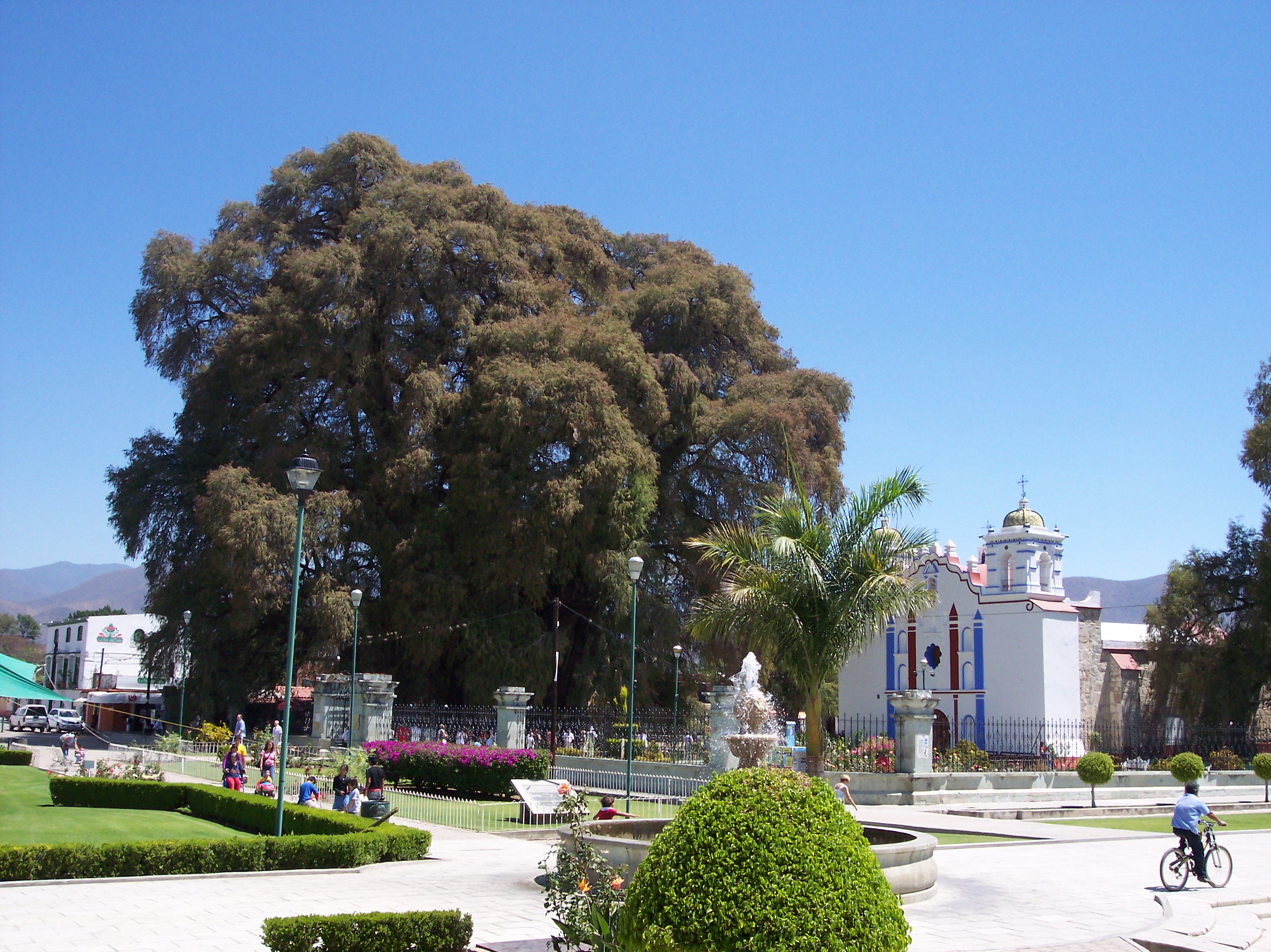 Located in: Santa María del Tule, Oaxaca, Mexico.